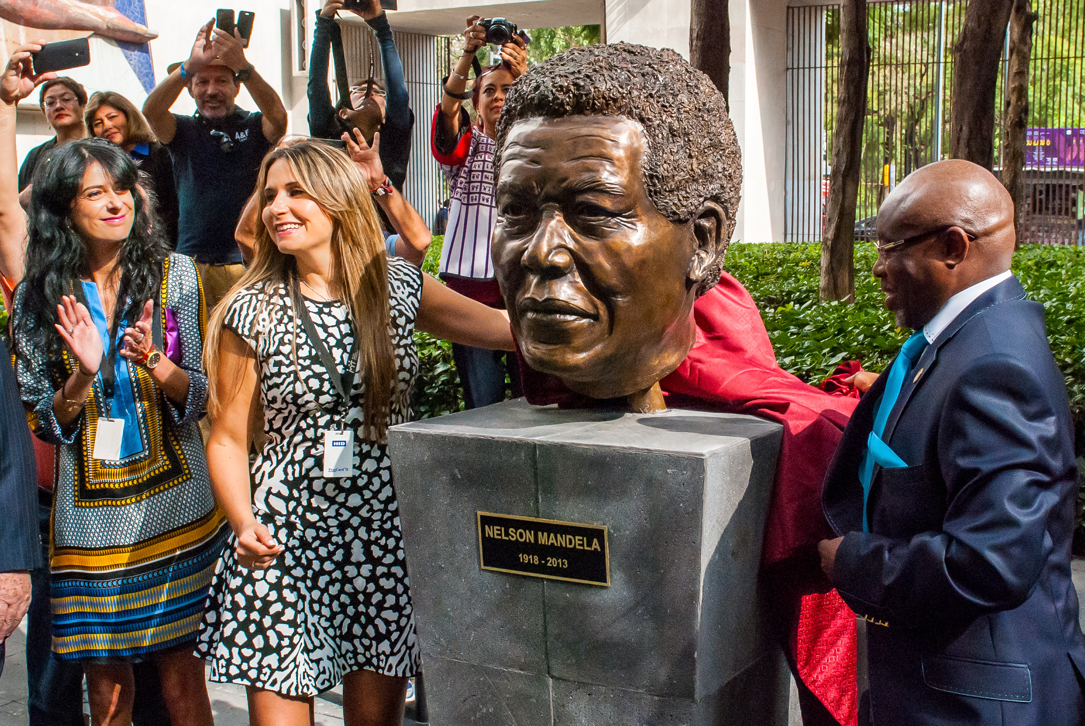 Sala de exposiciones temporales del Museo Memoria y Tolerancia.